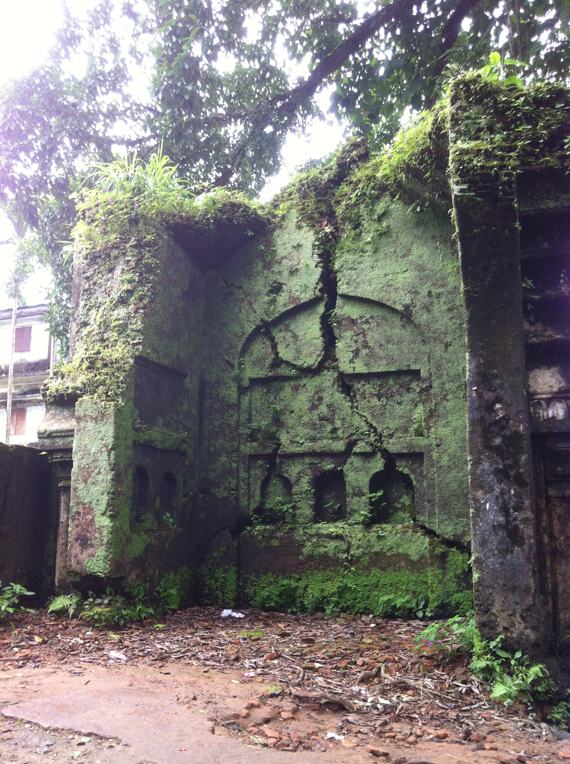 জয়েন্তশ্বরীর সম্মুখভাগ